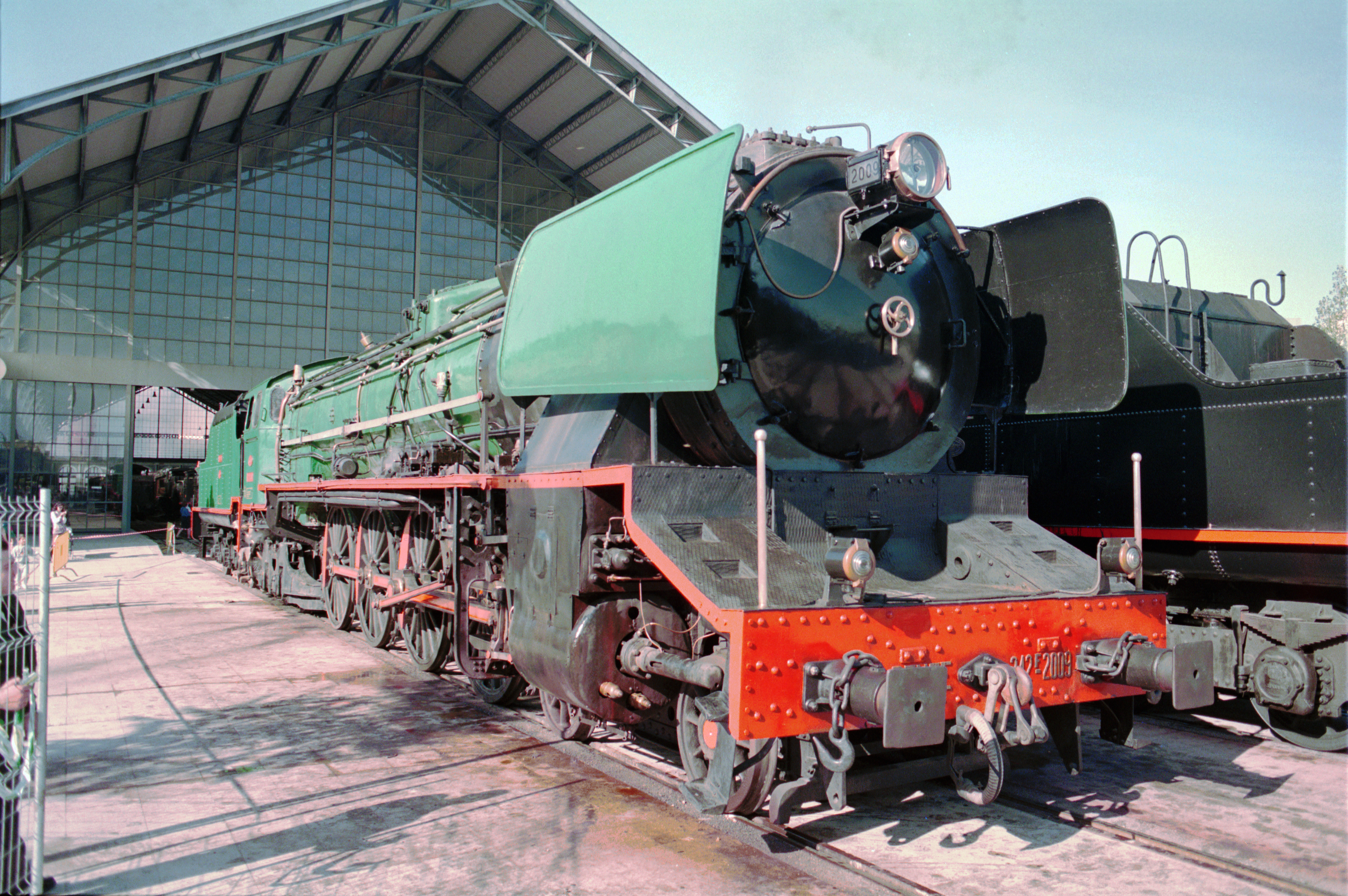 The spanish 242 f 2009, class "Confederación", in an exibition in the "Museo del Ferrocarril de Delicias" (Delicias Railroad Museum), Madrid. Around 1994.